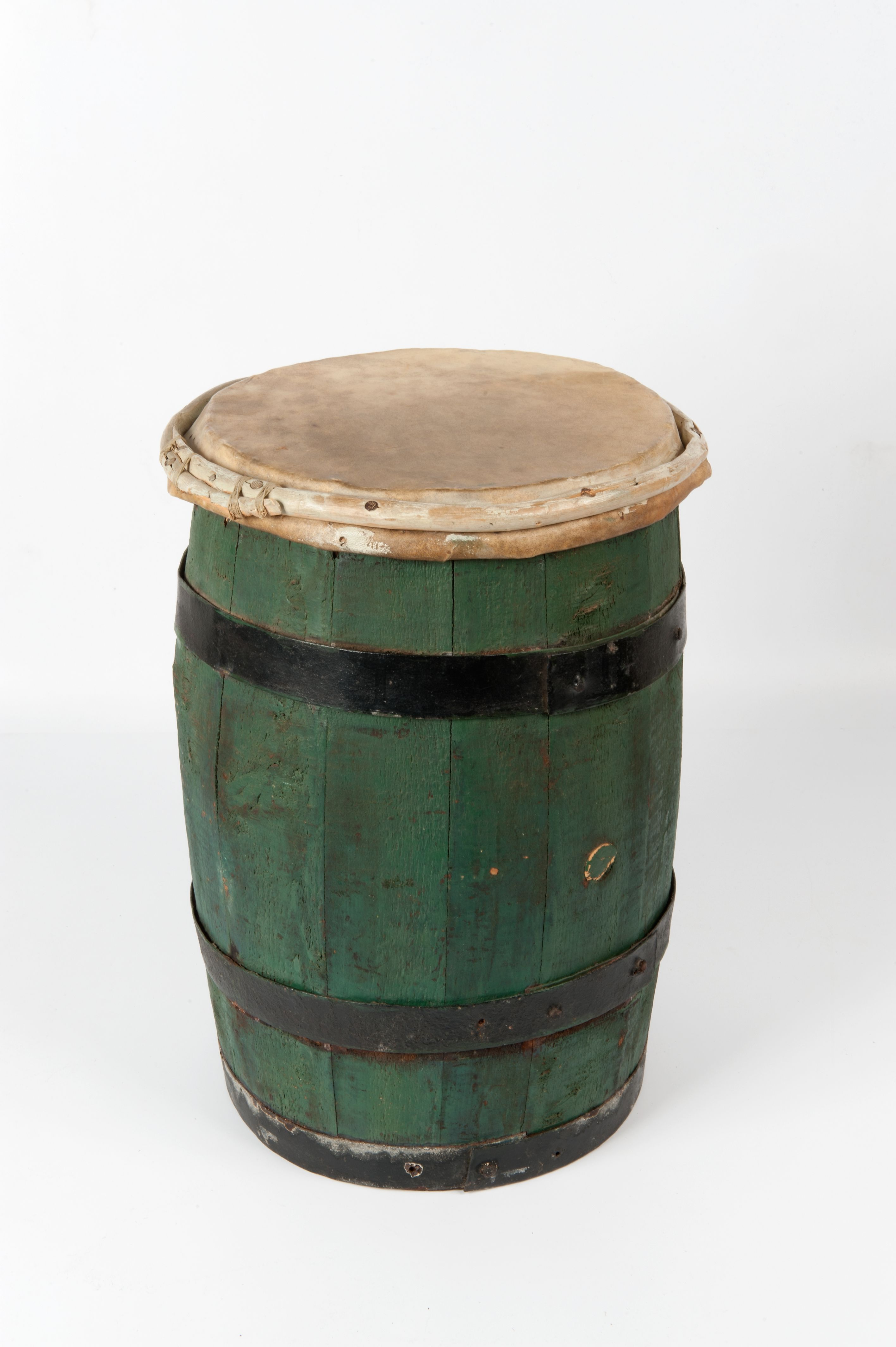 trom. Trom onder andere gebruikt bij de zogeheten tambú, muzikale festiviteiten op Curaçao rondom de jaarwisseling.